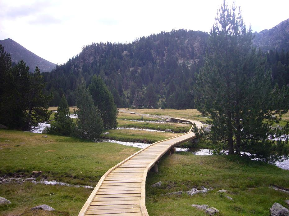 Prats d'Aigudassi; la Vall de Boí, Alta Ribagorça, Catalunya